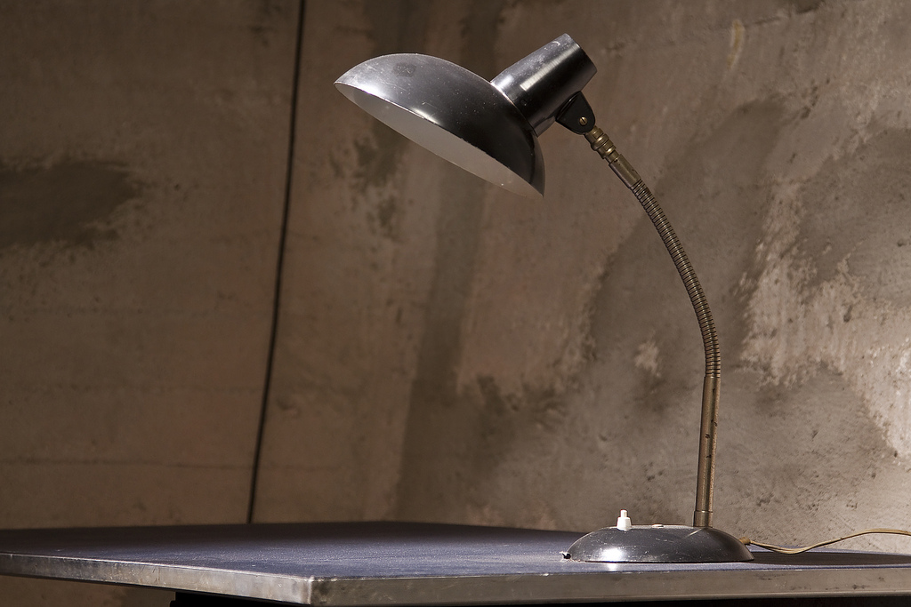 Bureaulamp, Expositie Dudok Dependance, Firma Gispen, Rotterdam Bureaulamp